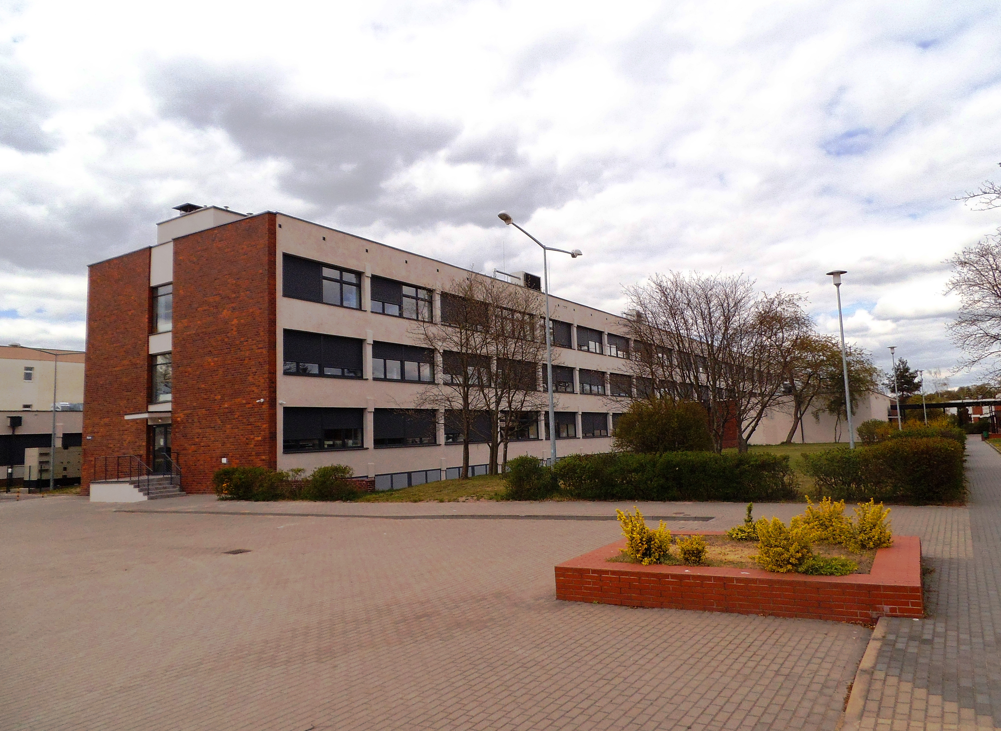 Budynek Instytutu Nauk Pedagogicznych UMK w Toruniu